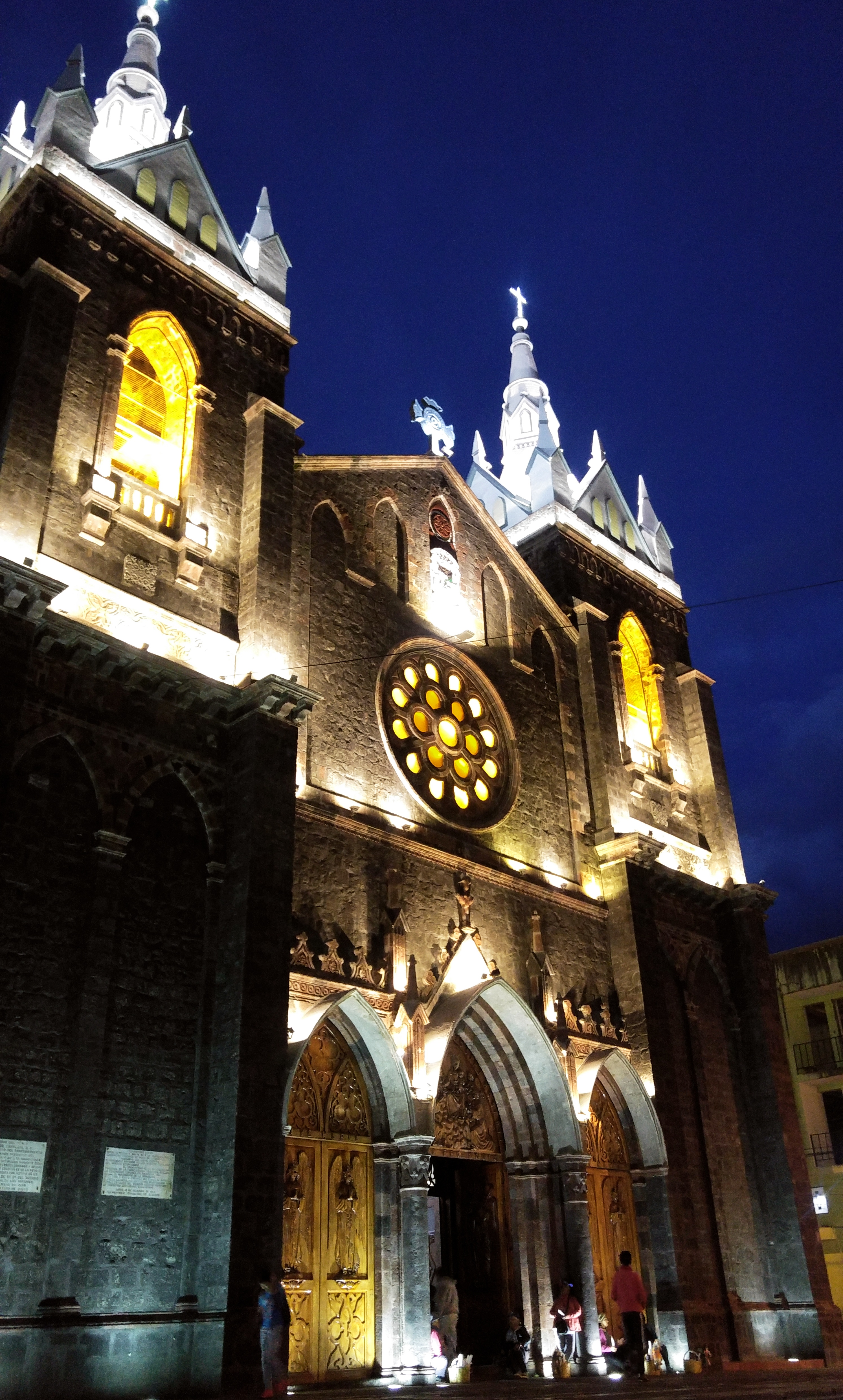 Vista nocturna de la Basilica